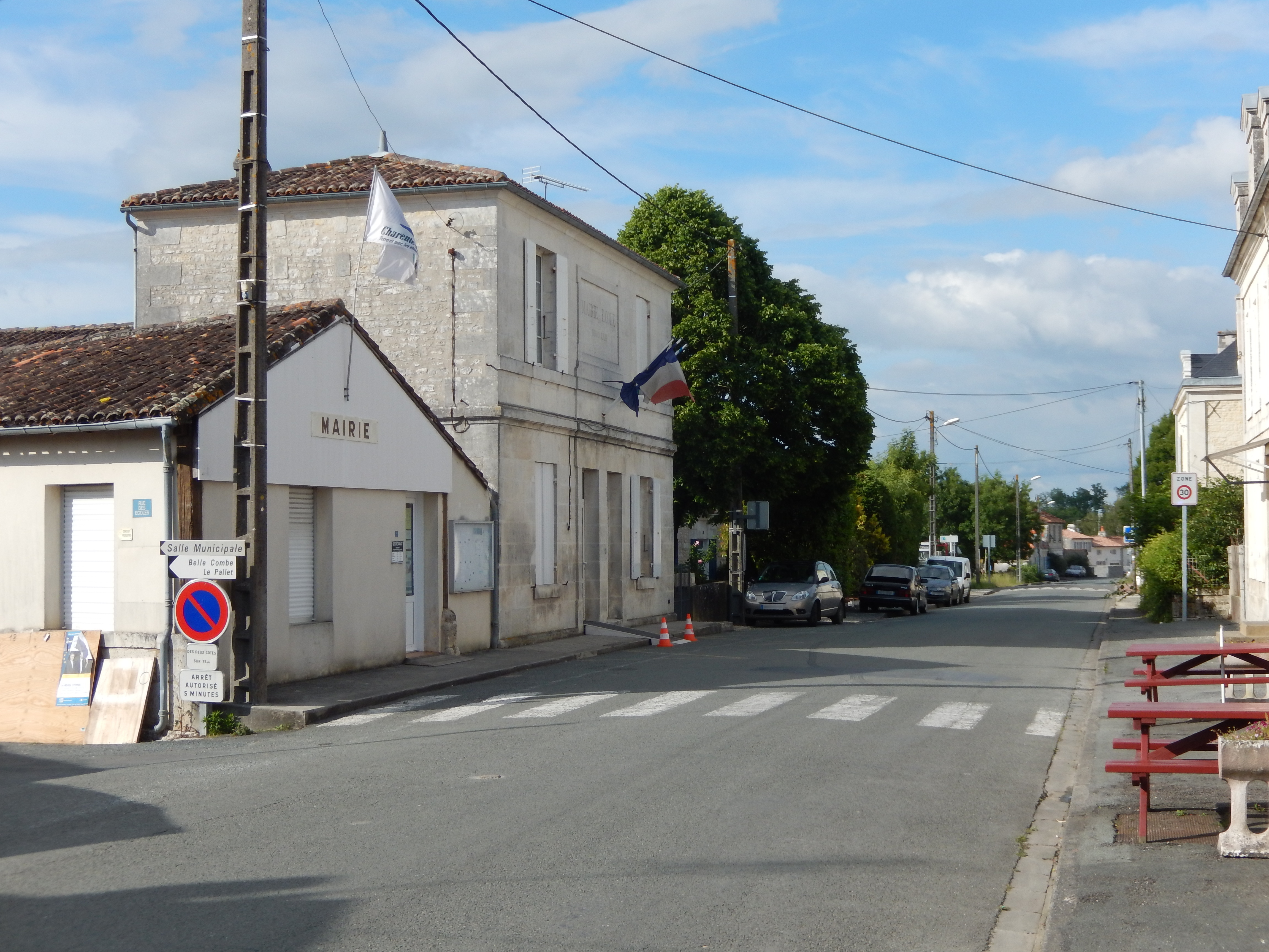 Les Essards, Charente-Maritime, France • La rue de l'hôtel de ville porte bien son nom aux Essards puisque la mairie de la commune y est située.